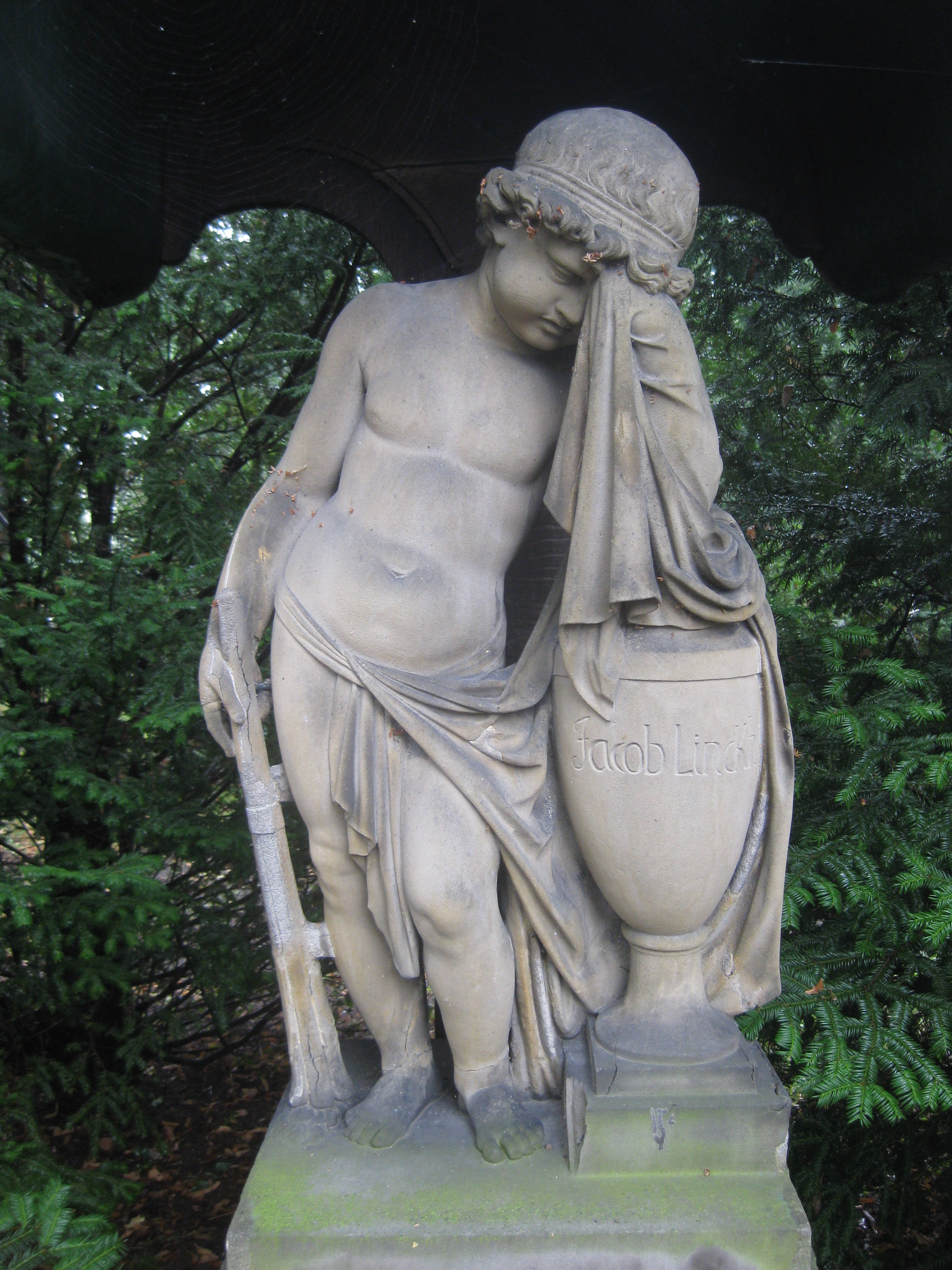 Scheffauer, Philipp Jakob: Trauernder Genius, Ausführung in Sandstein von Joseph Wilhelm Ludwig Mack, Stuttgart, Steigfriedhof, Abteilung 6 (beim Eingang), Grabmal des Posthalters Jacob Linckh (1767-1794)